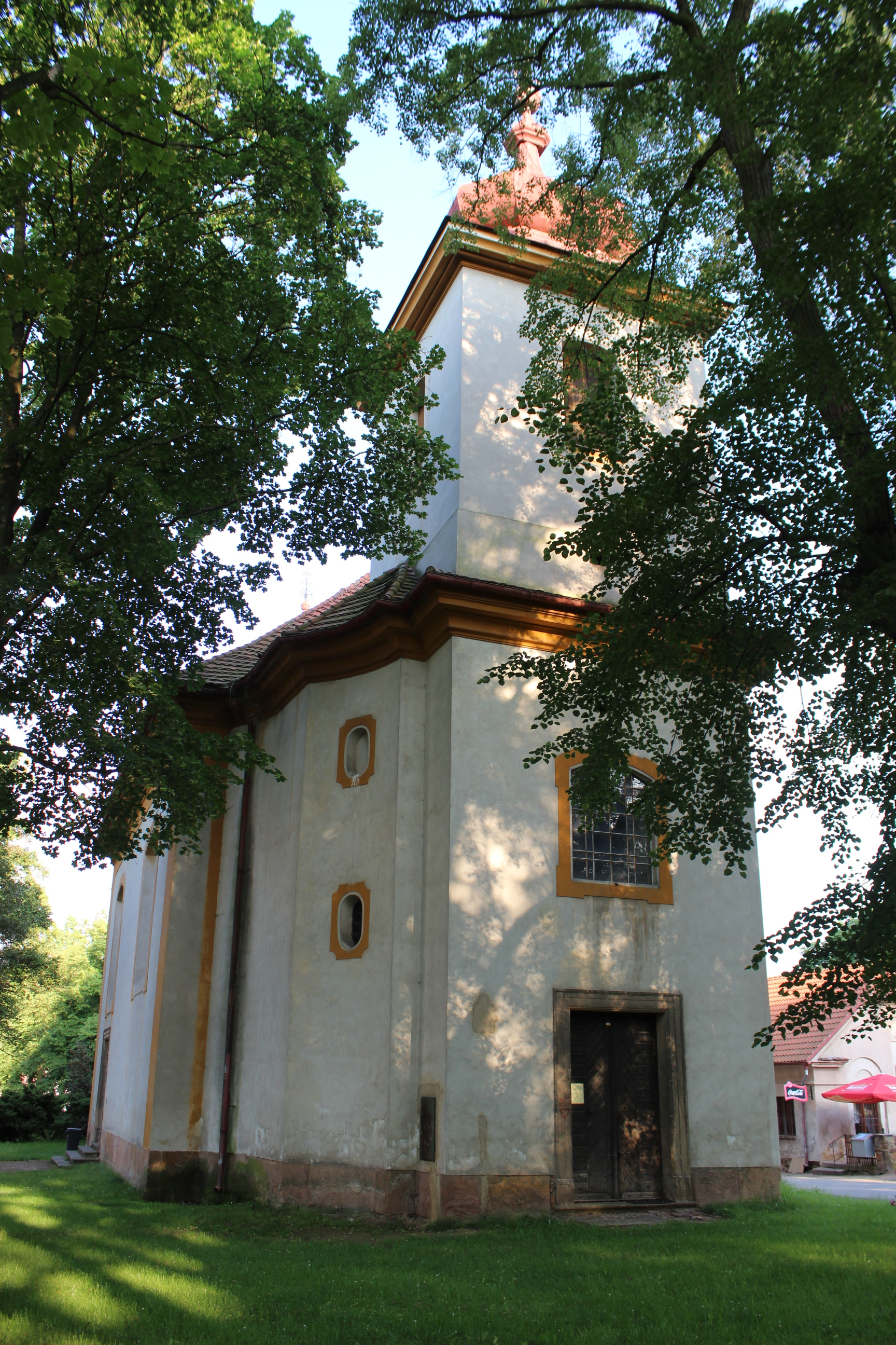 Kostel svaté Barbory v Lužné (pohled od severozápadu).